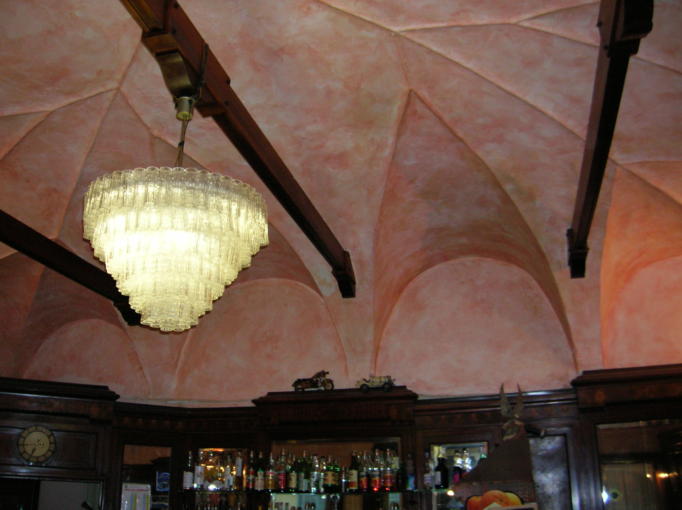 soffitto a pennacchi, forse gotico, all'interno della pasticceria Pedrabissi, ad Asso